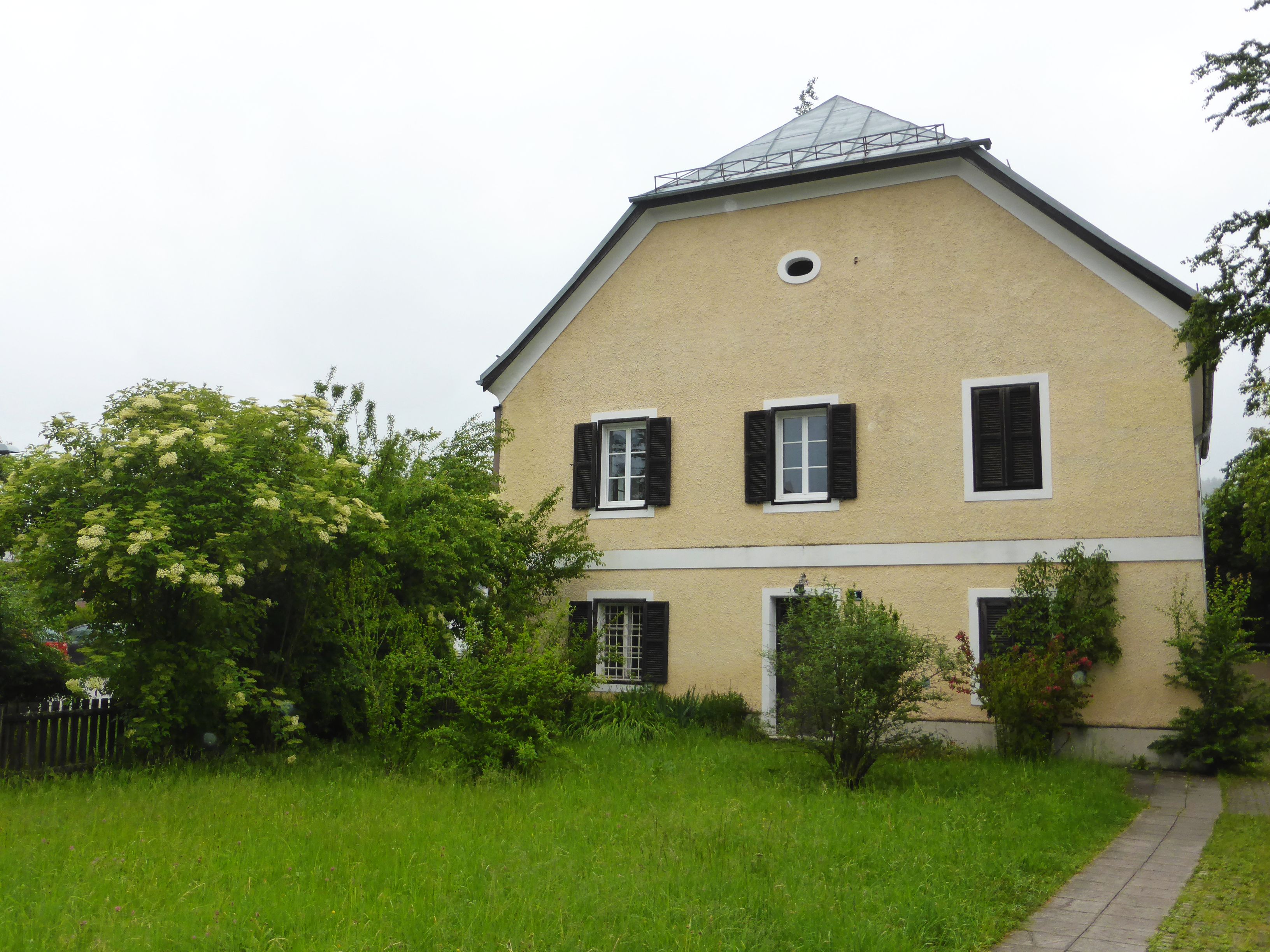 Bezirksgericht (ehem. Pfleggericht)